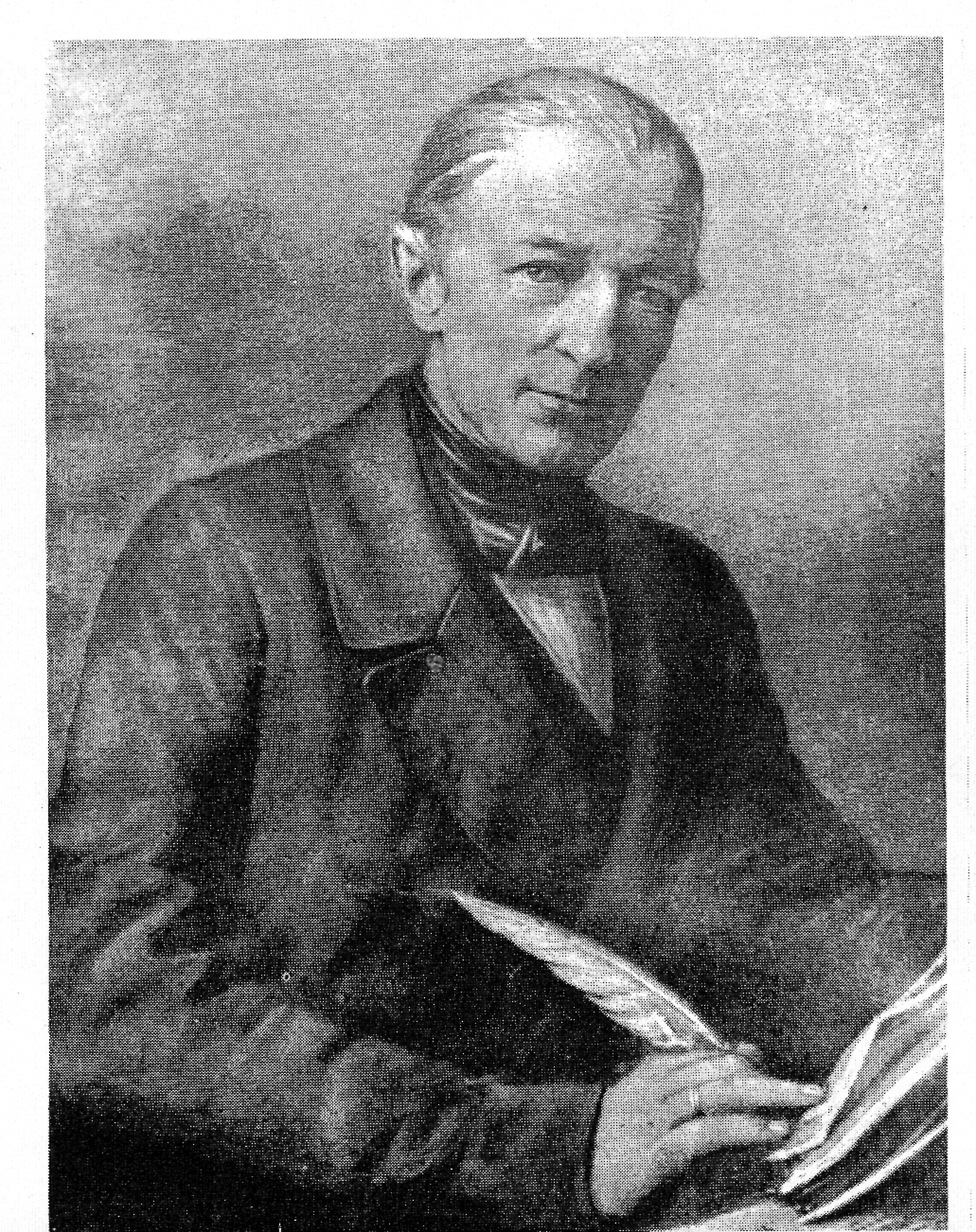 Porträt Georg Kloß (1787-1854) aus dem Gedenkheft der Loge zur Eintracht in Frankfurt